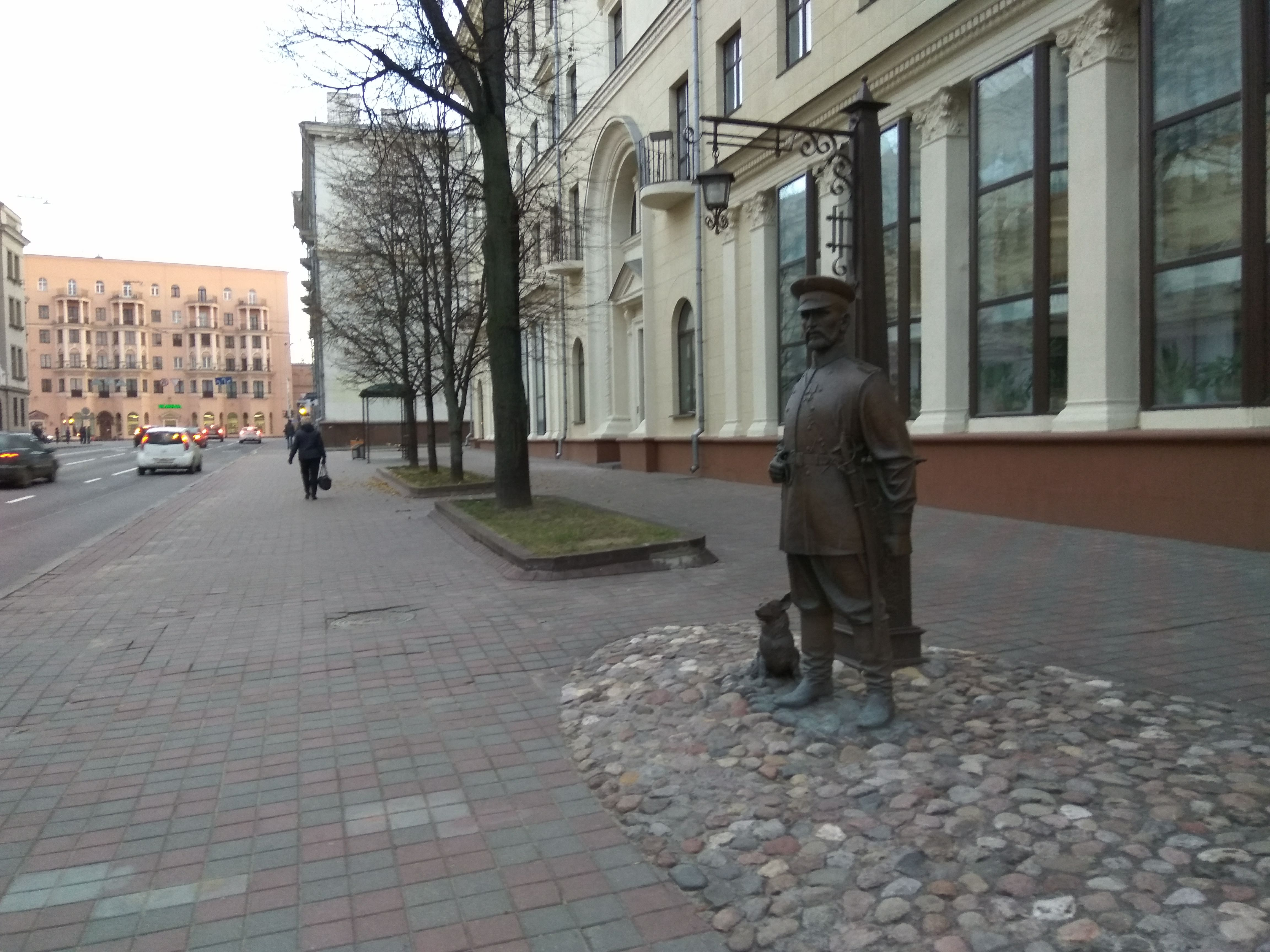 Мінск. Вуліца Гарадскі Вал